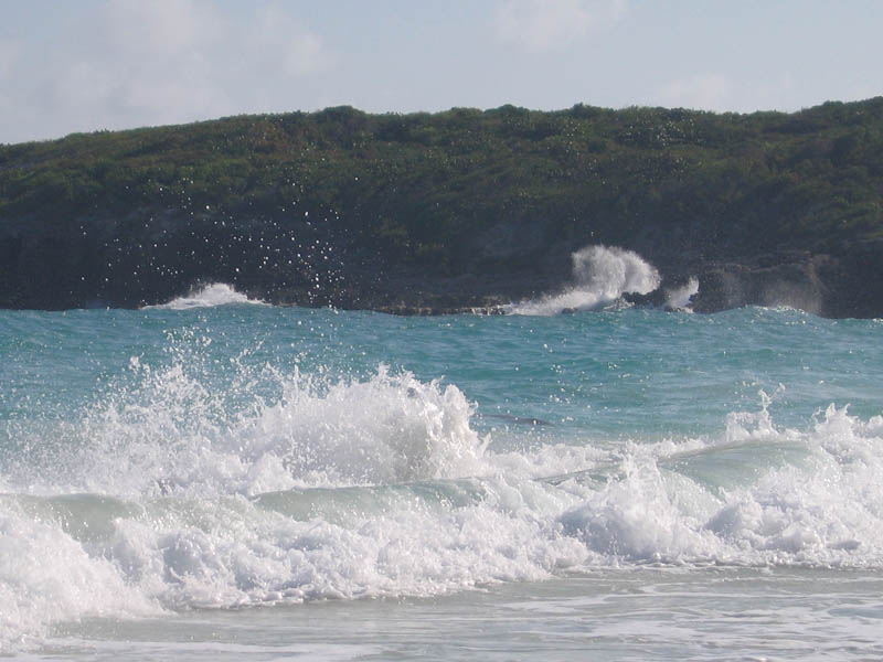 Playa Navio, Vieques island - Puerto Rico.